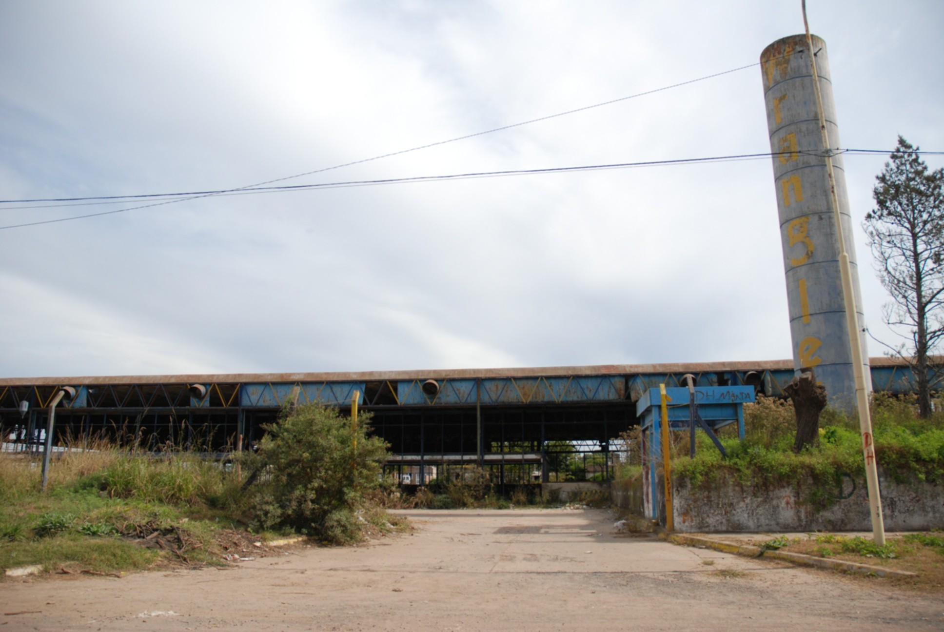 Fábrica Wrangler abandonada en Pergamino, provincia de Buenos Aires, Argentina